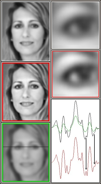 Bildfilter Unscharf maskieren Urheber der Bilder, Zeichnung und Zusammenstellung: Anton (rp) 2004